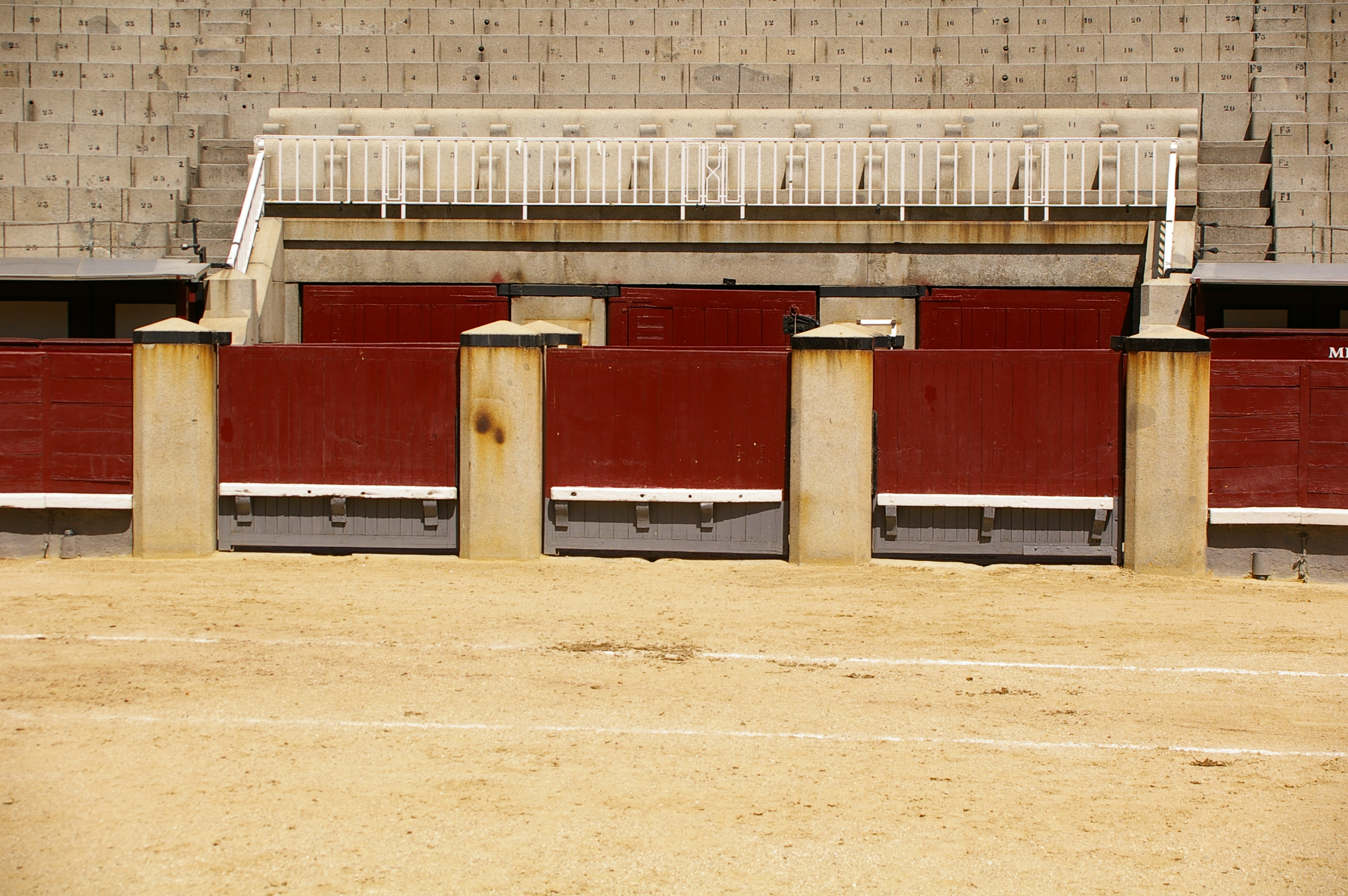 Puerta de los chiqueros de una plaza de toros (Las Ventas)